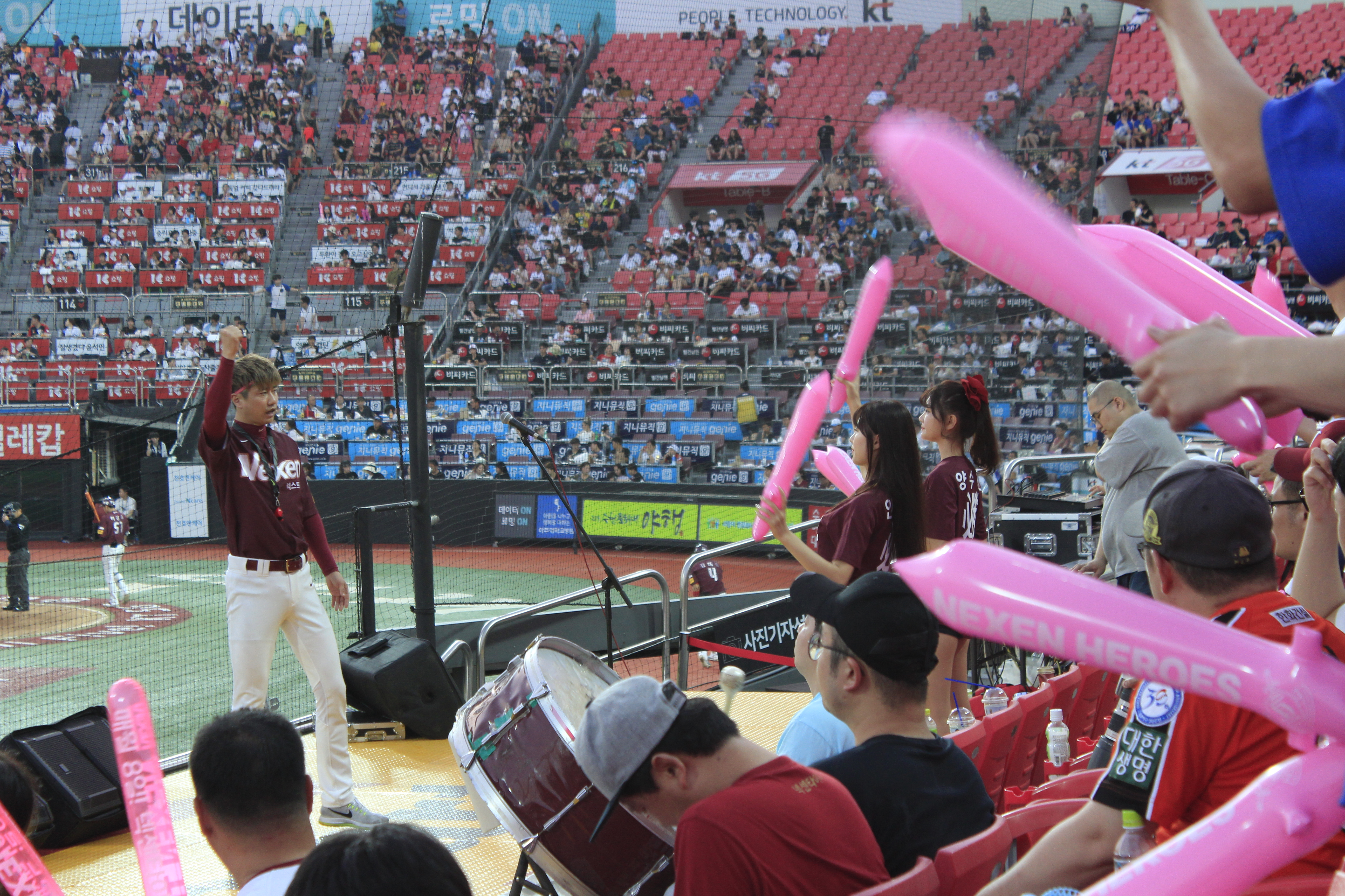 수원 야구장에서 열띤 응원을 펼치는 넥센 히어로즈의 팬과 응원단